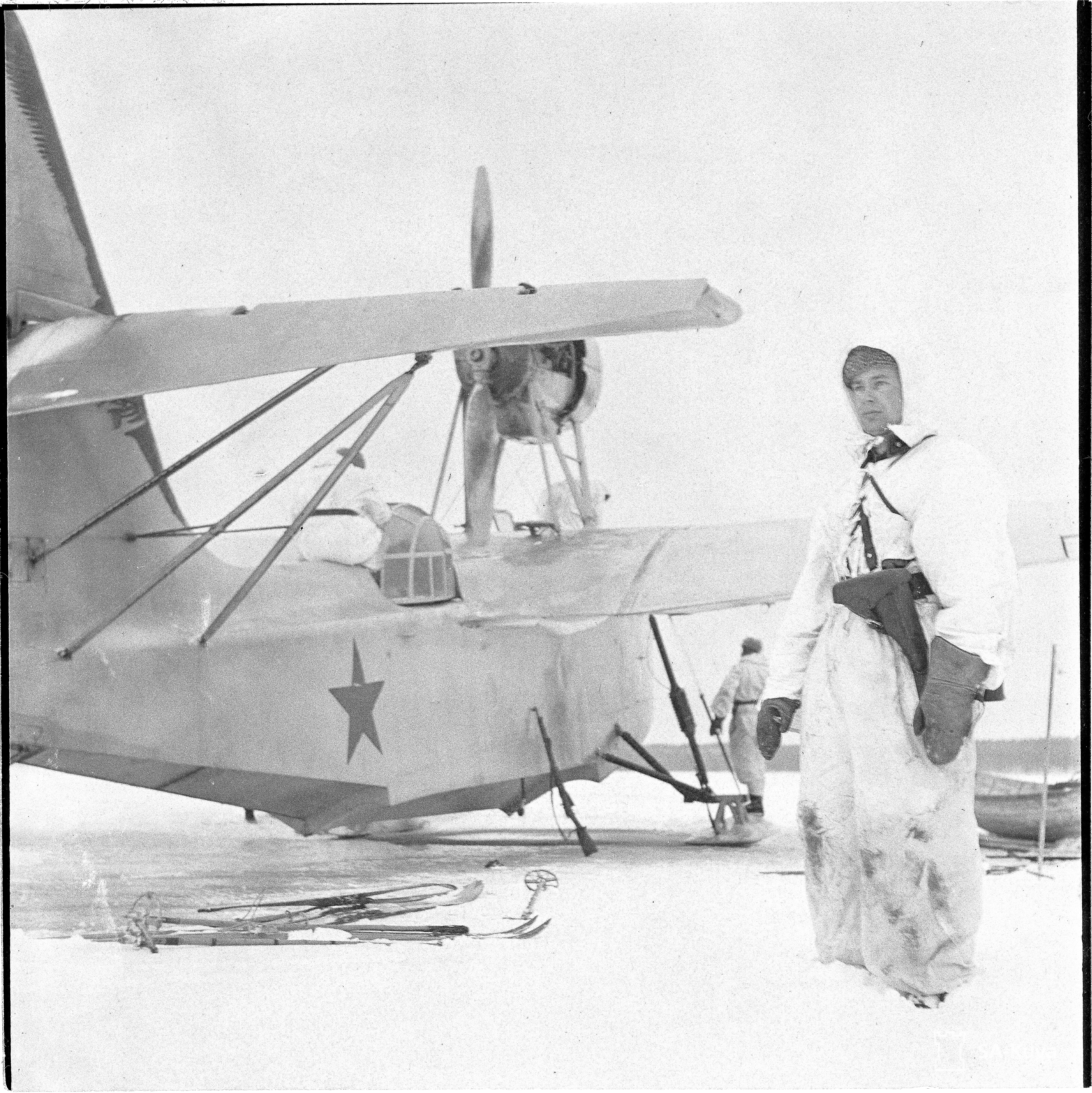 Luutnantti Kainulainen, joka ensimmäisenä partionsa kanssa löysi ryssien lentoveneen. Koneessa olleet kolme lentoupseeria olivat lähteneet hiippailemaan jäälle, apunaan koneesta irroittamansa nestekompassi, mutta heidät saatiin kiinni jo aamun valjetessa. (Kuvassa on Beriev MBR-2). Kuvauspaikka: Mustaniemi